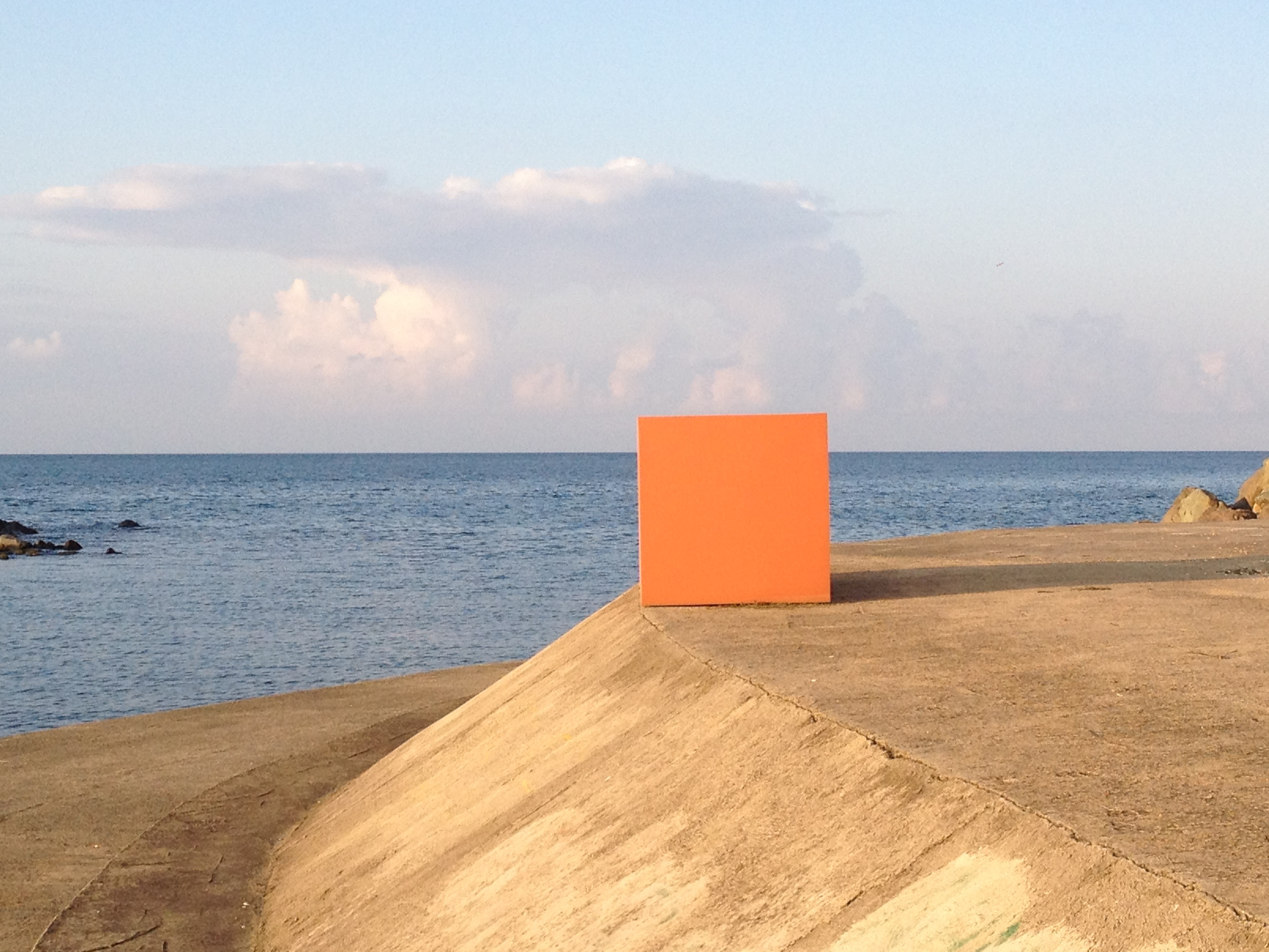 Divan - Türkische Sofafahrten 2014